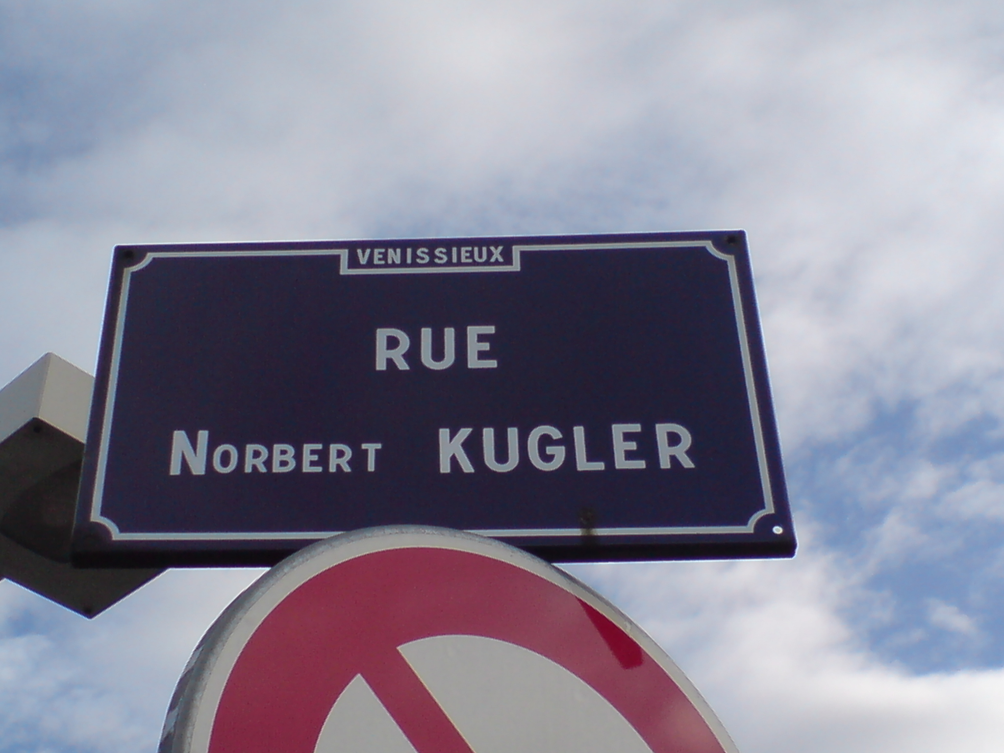 Rue Norbert Kugler, Vénissieux, France. Photo collection privée Michel Kugler.